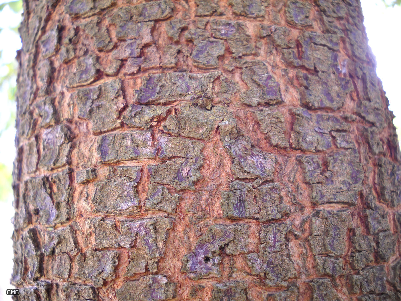 Bark